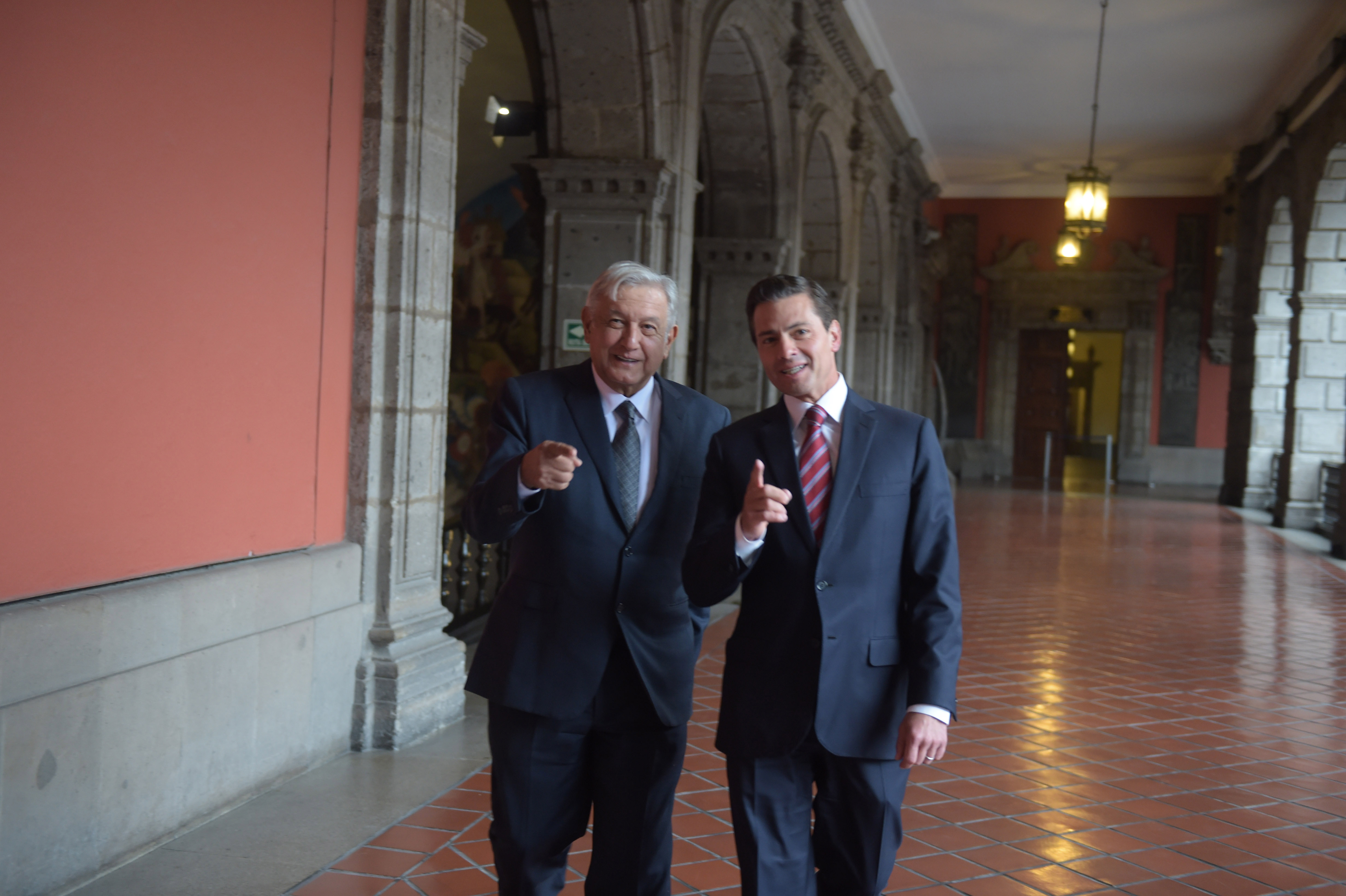 Reunión Peña Nieto-López Obrador en Palacio Nacional el 9 de agosto de 2018.